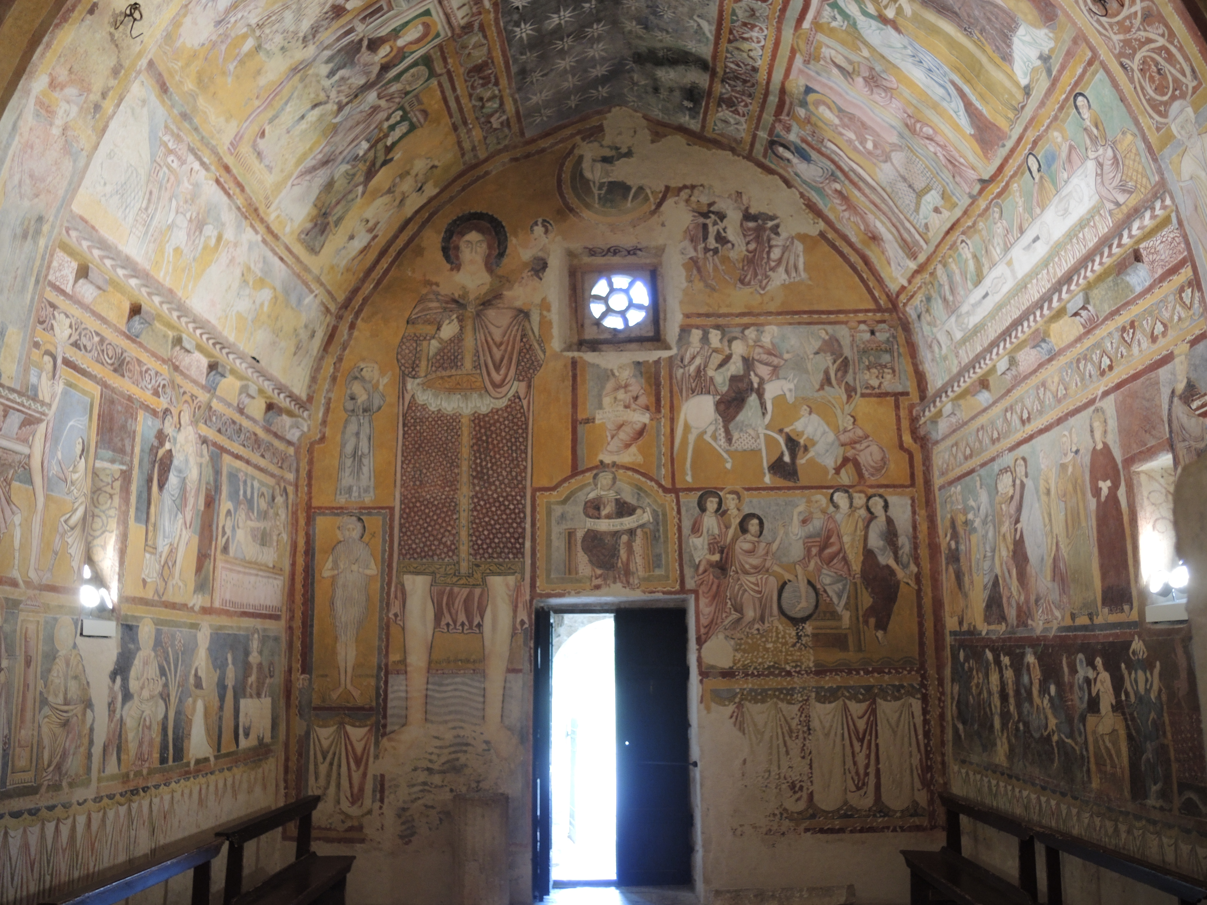 Bominaco: Oratorio di San Pellegrino